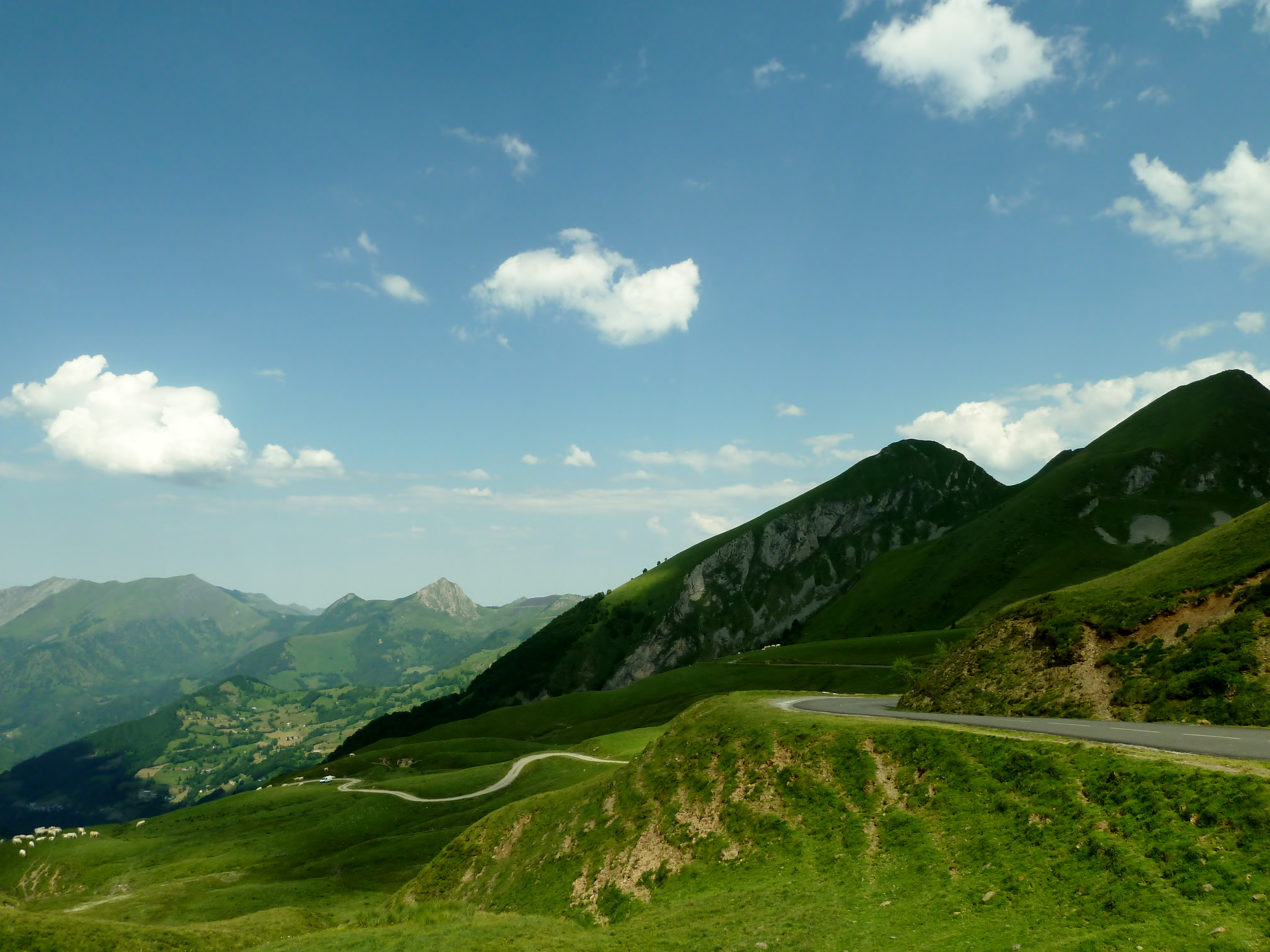 Route entre le col du Soulor et du col de l'Aubisque. Utilisez la fonction des cordonnées GPS de l'image pour savoir où elle a été prise.